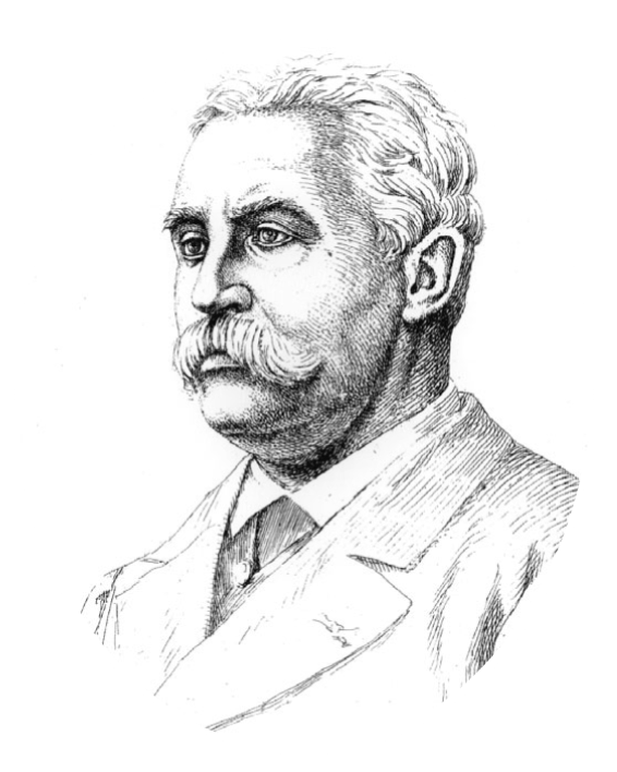 Achille Lacroix de Vimeur de Rochambeau (1836-1897)